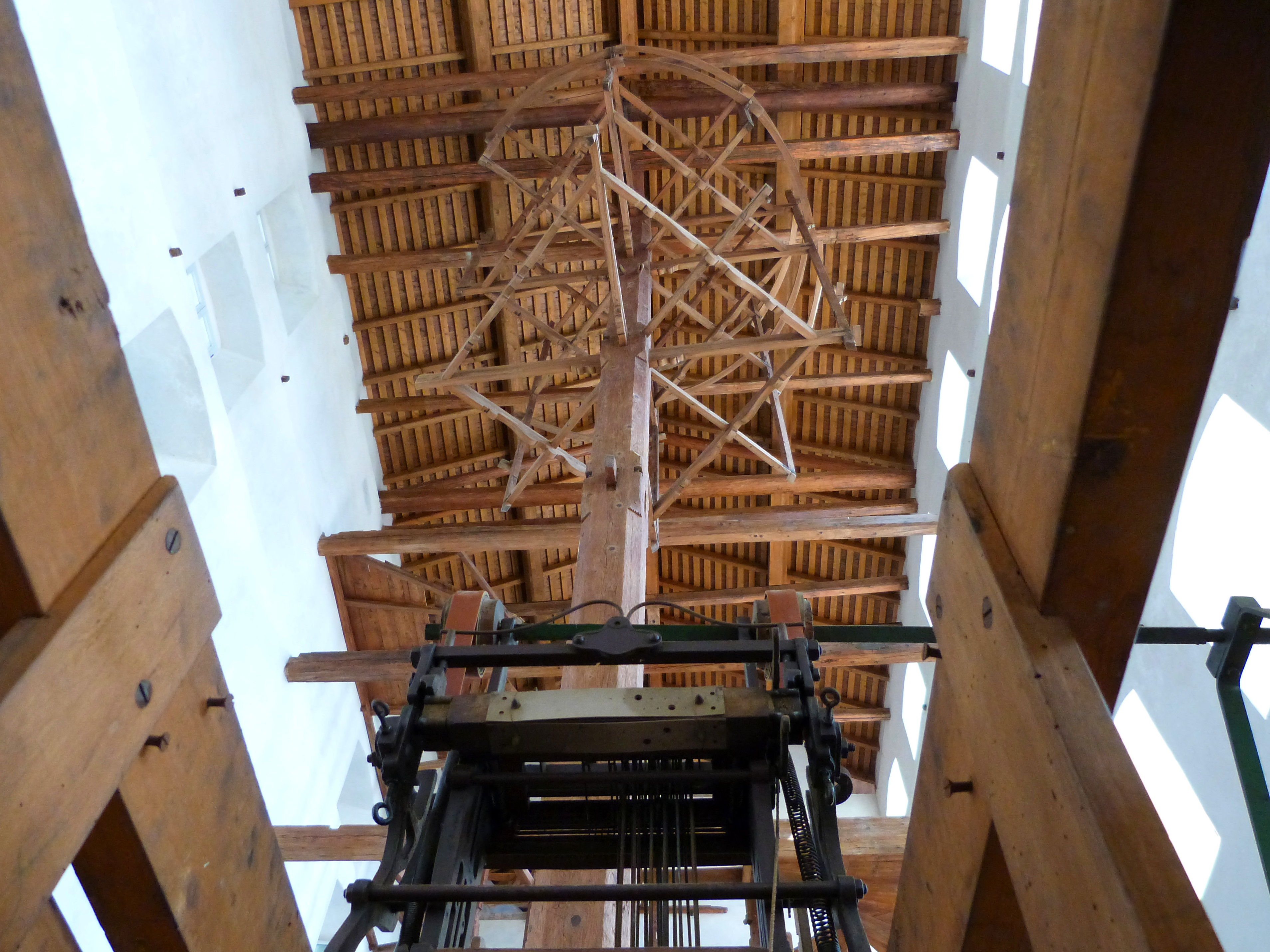 Antico Filatoio di Villa Lagarina adibito alla lavorazione della Seta (TN) This is a photo of a monument which is part of cultural heritage of Italy.